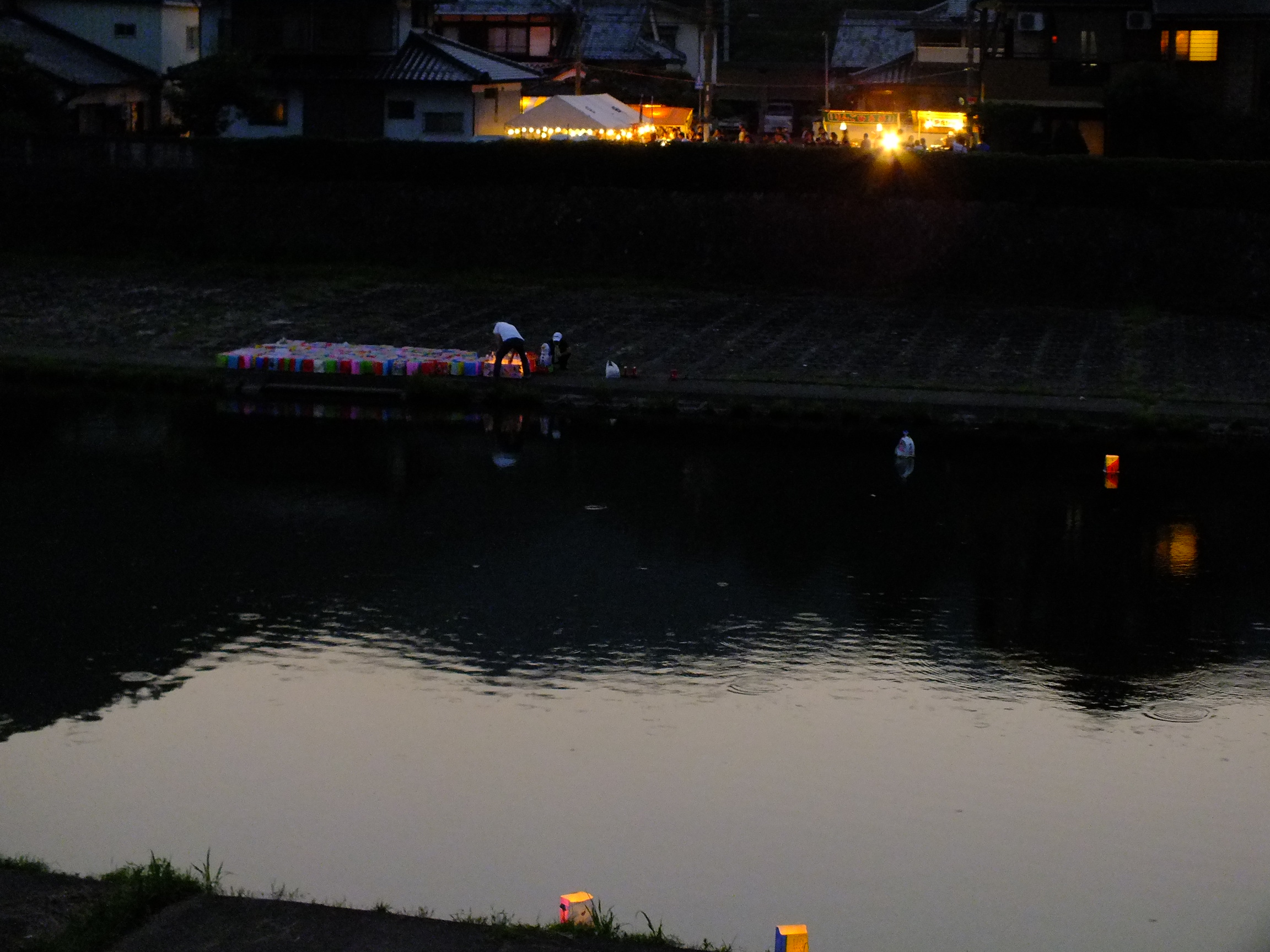 20140729 Ichijima-Kawasuso Matsuri 市島川裾祭（丹波市市島町）竹田川